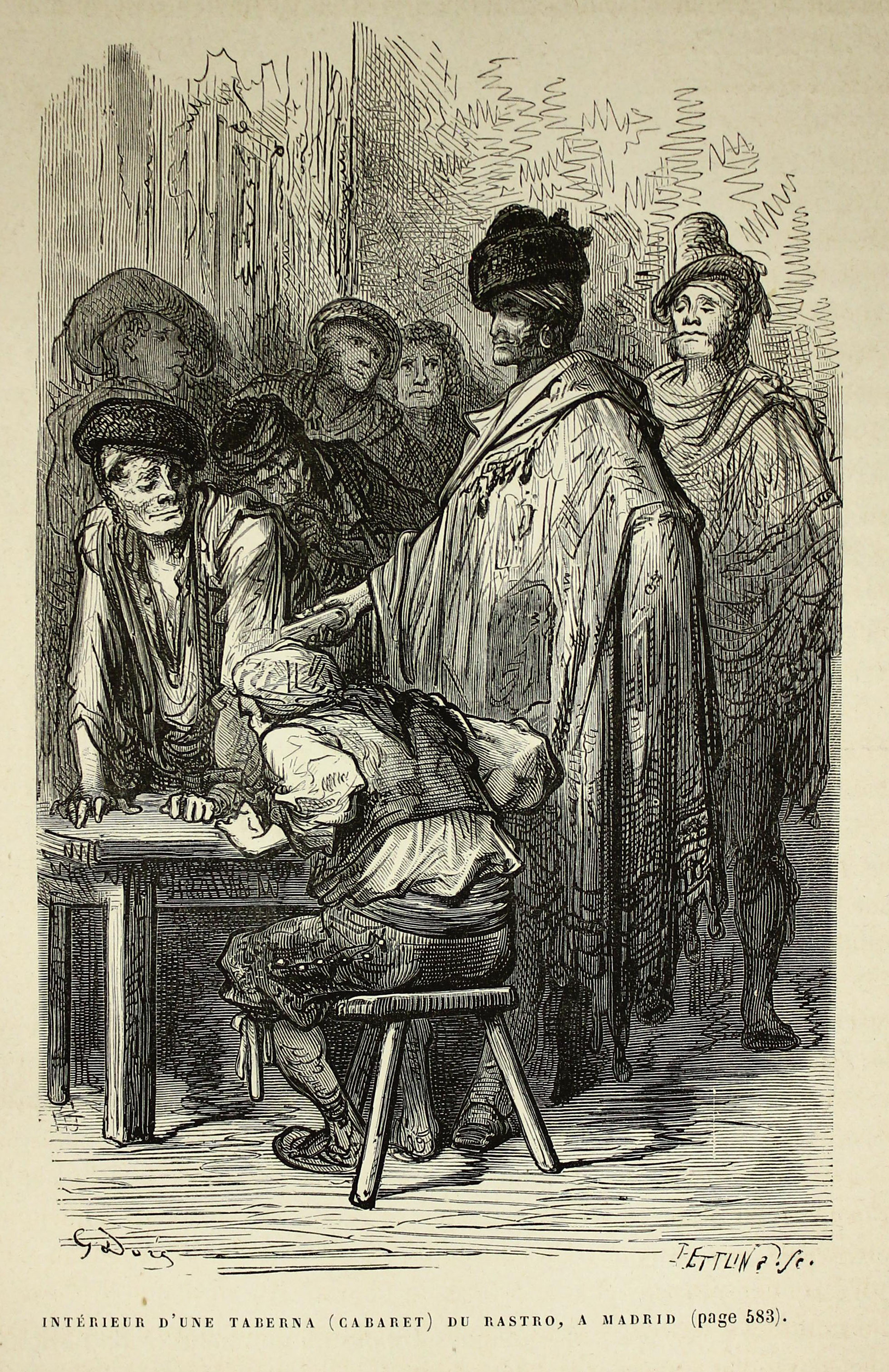 Autor: Davillier, Jean Charles, barón, 1823-1883 Descripción bibliográfica: L'Espagne / par Le Baron CH. Davillier ; ilustrée de 309 gravures dessinées su bois par Gustave Doré. - Paris : Librairie Hachette, 1874. - 799 p. : il. Materia: España- Geografía Materia: España- Usos y costumbres Ilustrador: Doré, Gustave, 1832-1883 Editor: Libreria Hachette Lugar de impresión: Francia, París Localización: Libro completo